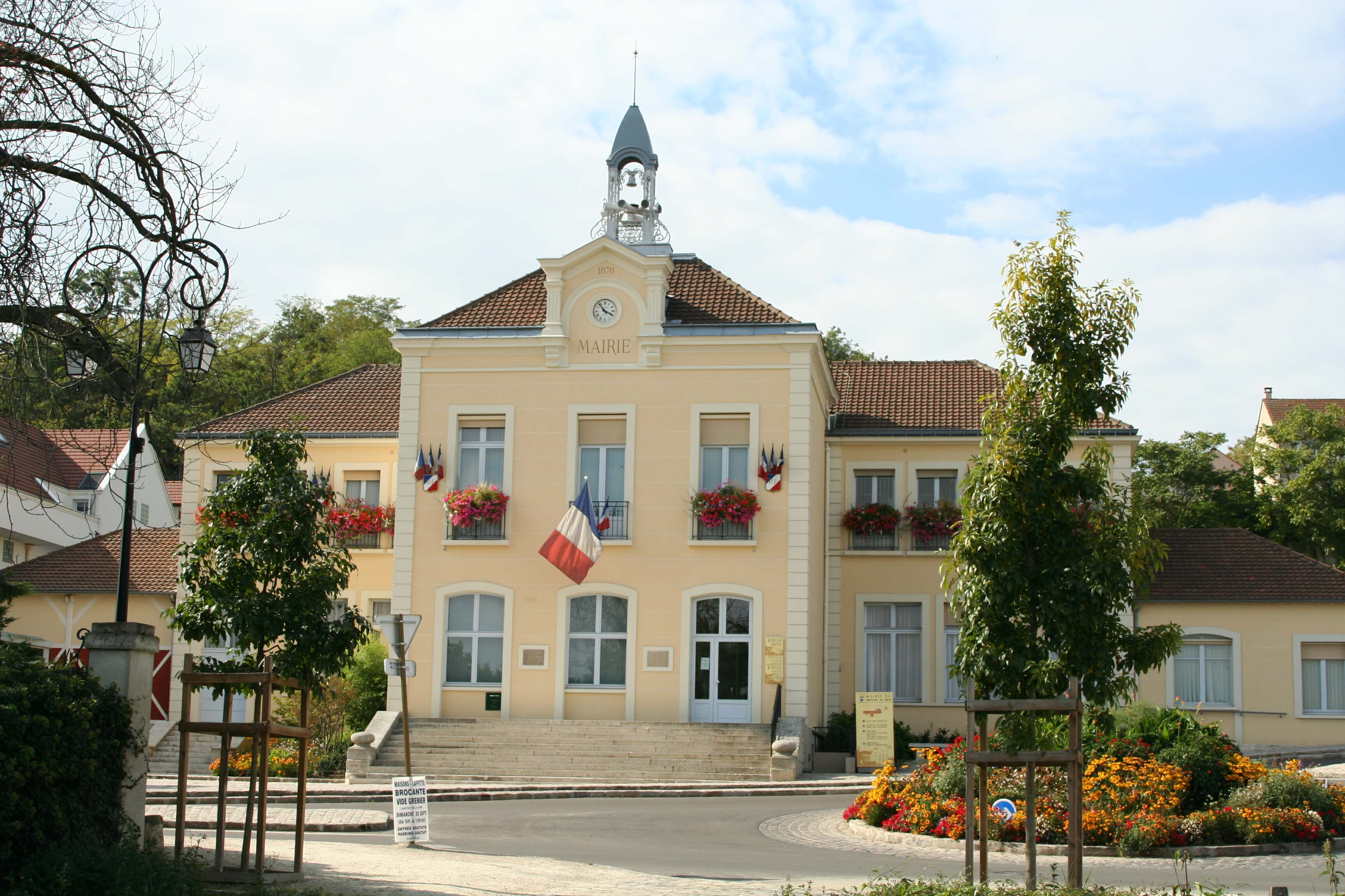 Mairie du Mesnil-le-Roi - Yvelines (France)